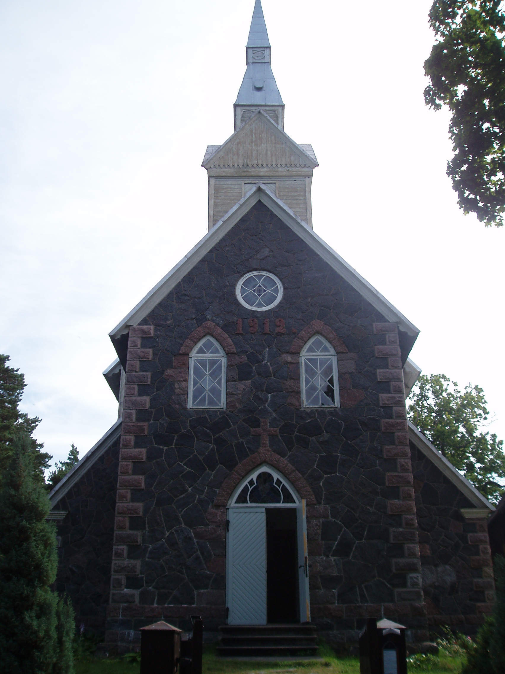 Vaade kirikule läänest.